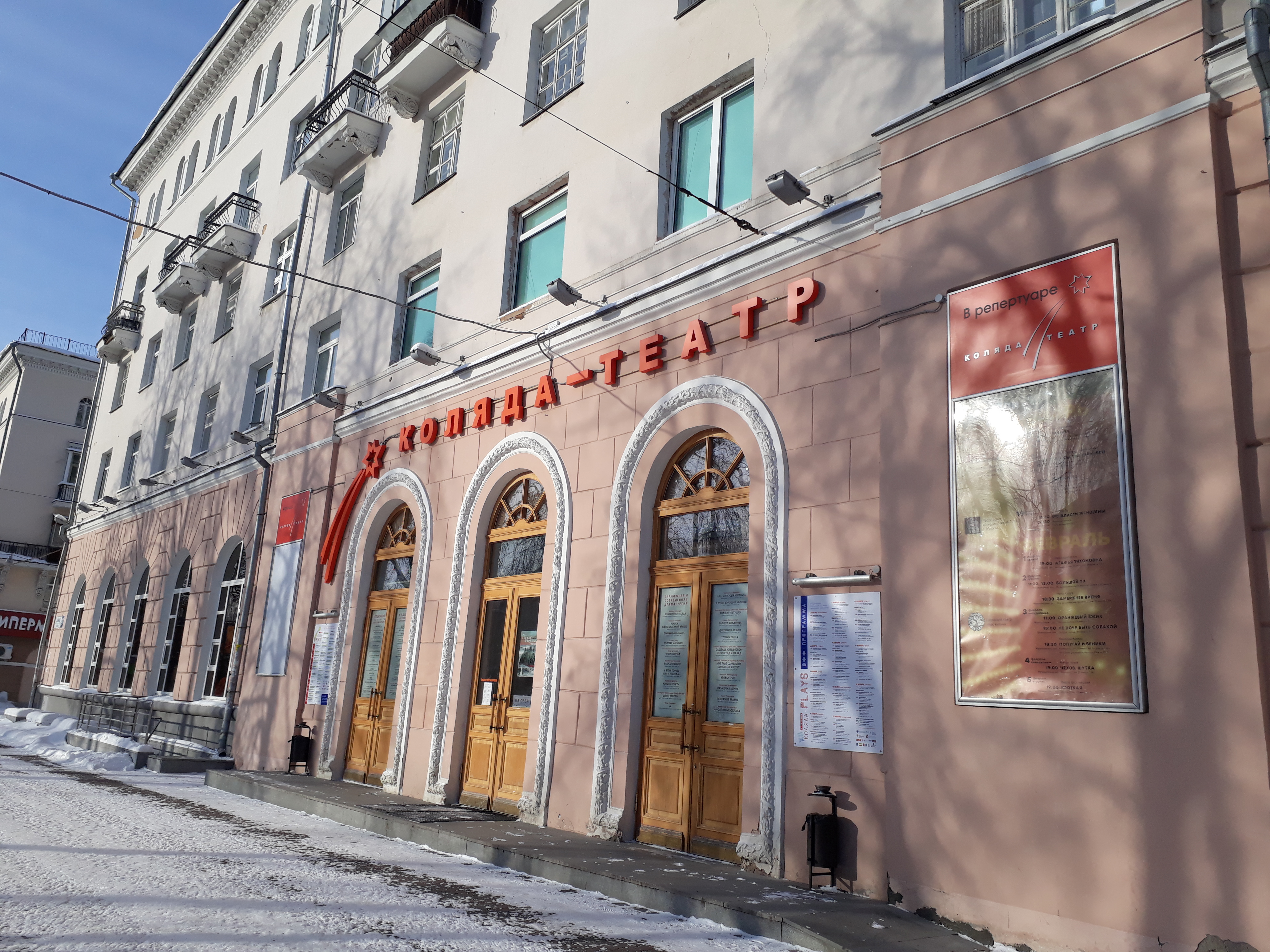 Февраль 2019